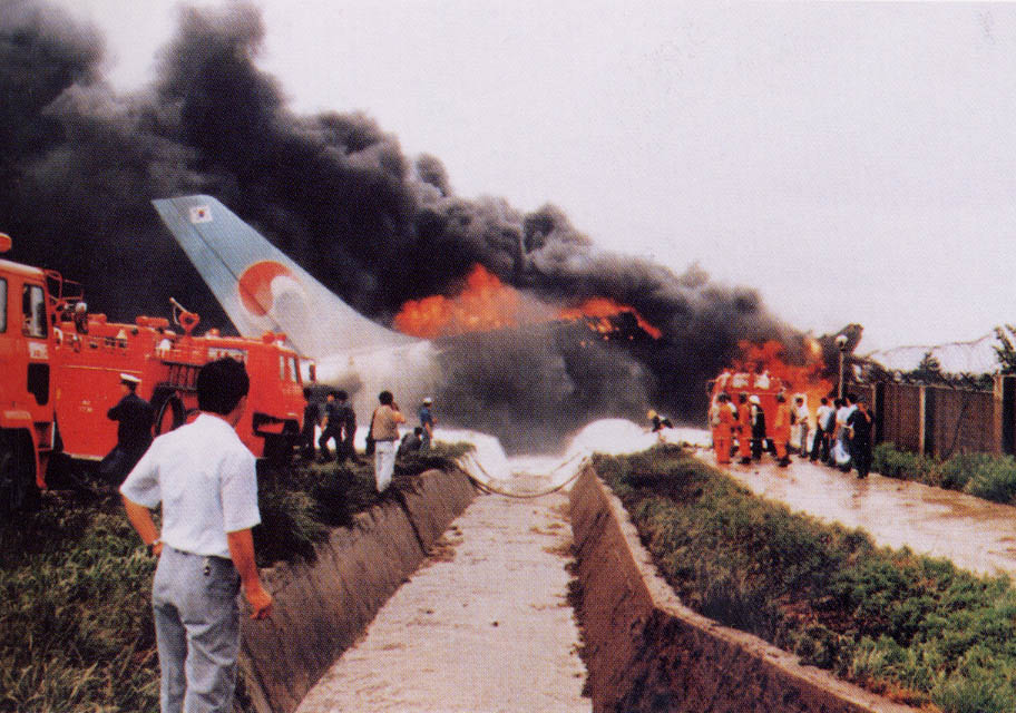 1994 0810 제주공항 KAL 여객기 사고